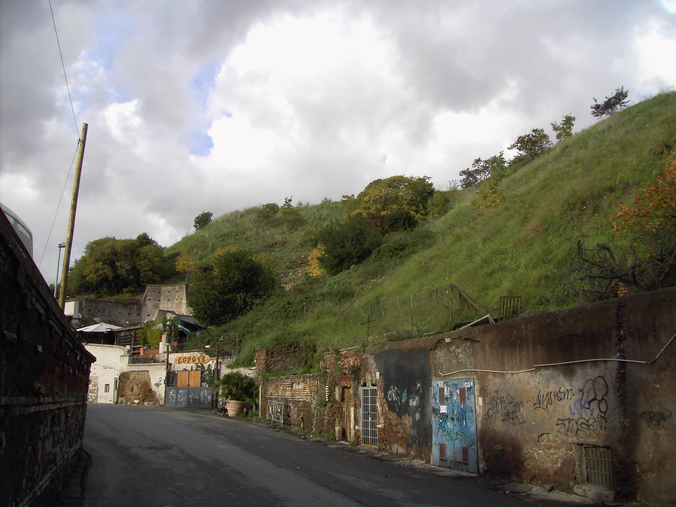 Roma, Testaccio: monte dei cocci e manufatti di scolo e di sostegno by Lalupa